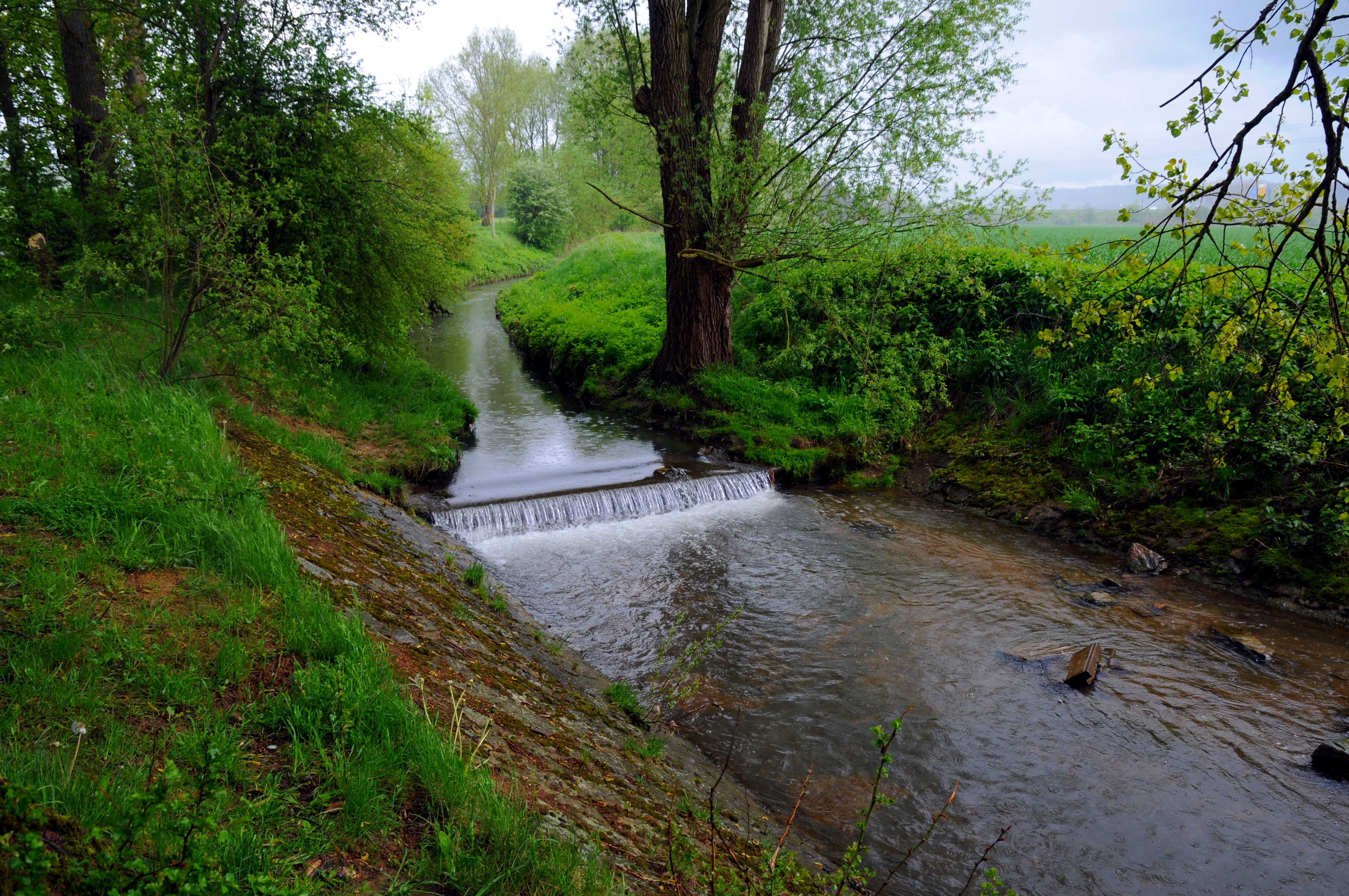 D'Diddelengerbaach op Schélek . This photograph was taken with a Nikon D300. This raster graphics image was created with GIMP